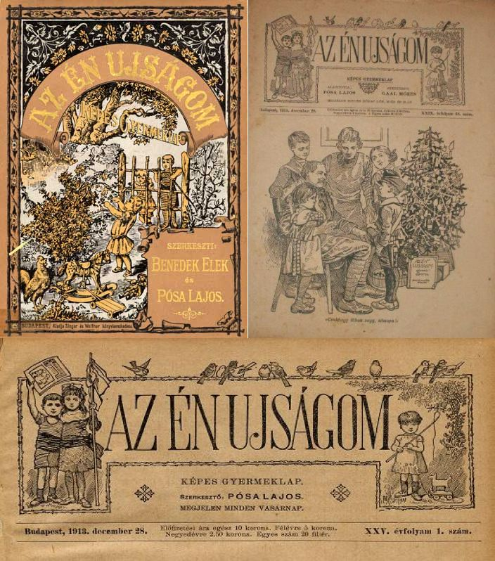 Az Én Újságom címlapja 1913 december 28-án Az Én Újságom című lap 1899. december 15-én indult, a 6-10 éves korosztálynak szólt. Első szerkesztői Benedek Elek író és Pósa Lajos költő voltak.